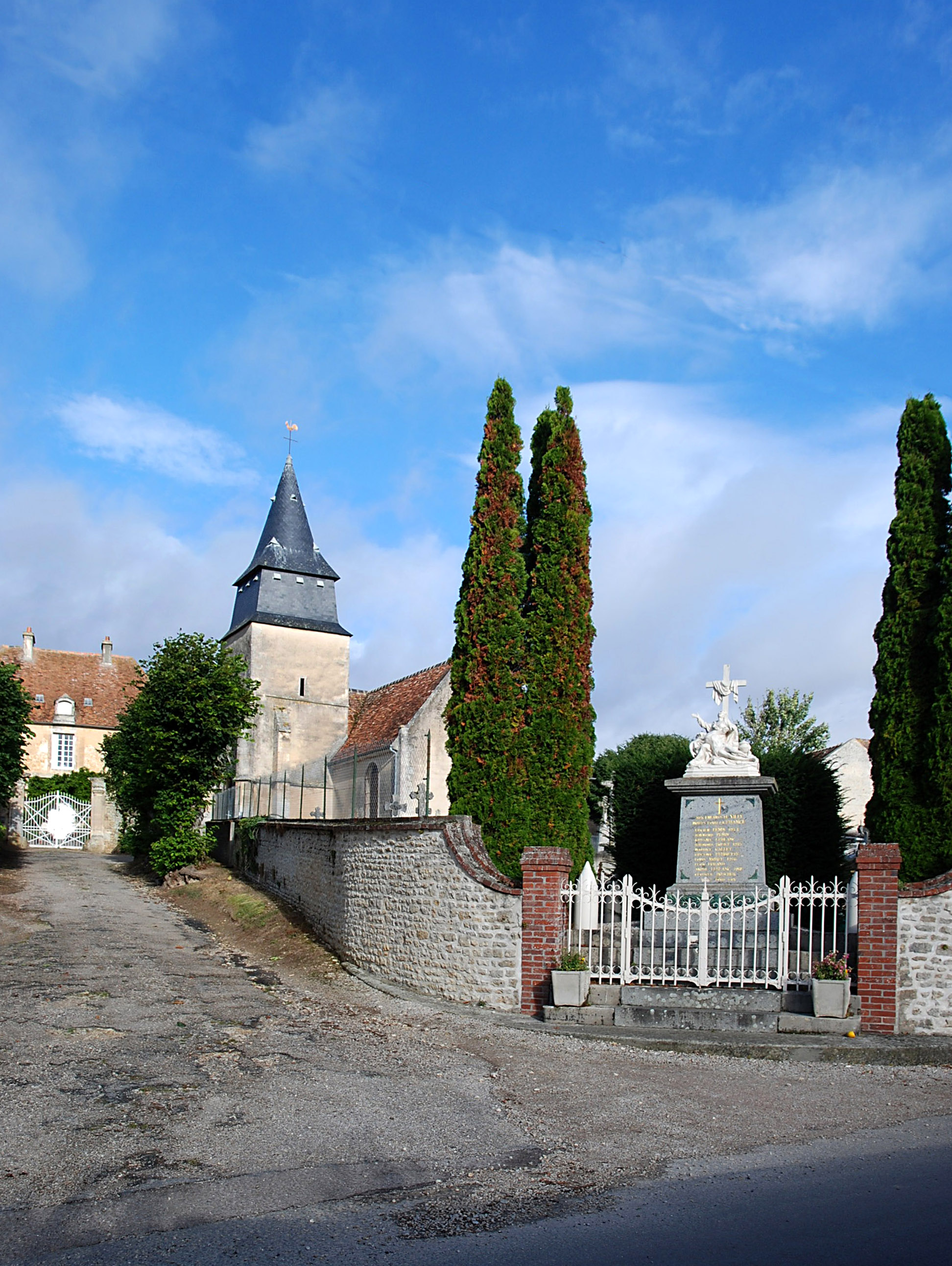 Villy-lez-Falaise (Calvados)